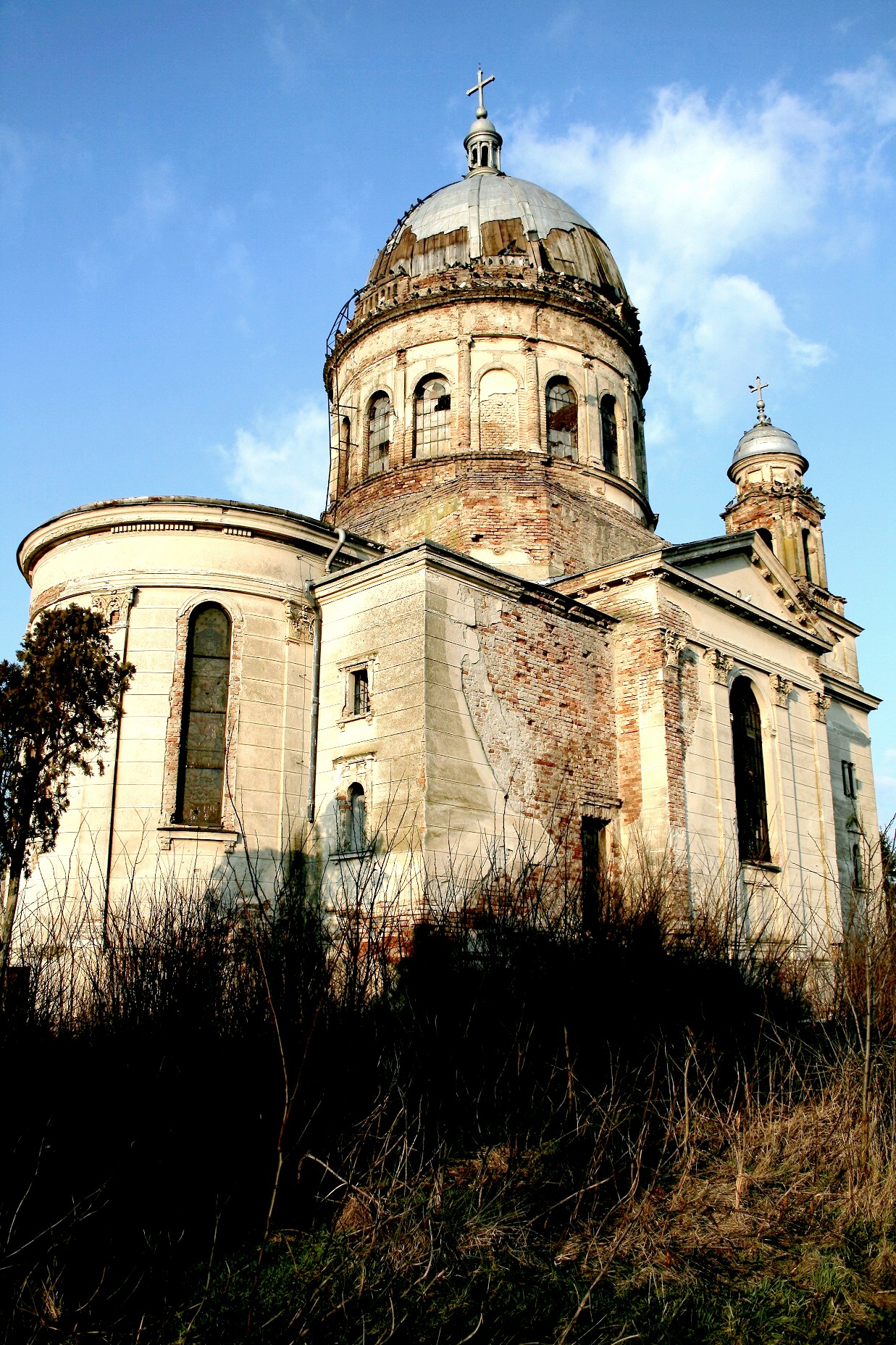 Biserica romano-catolica din satul Bobda Timis.